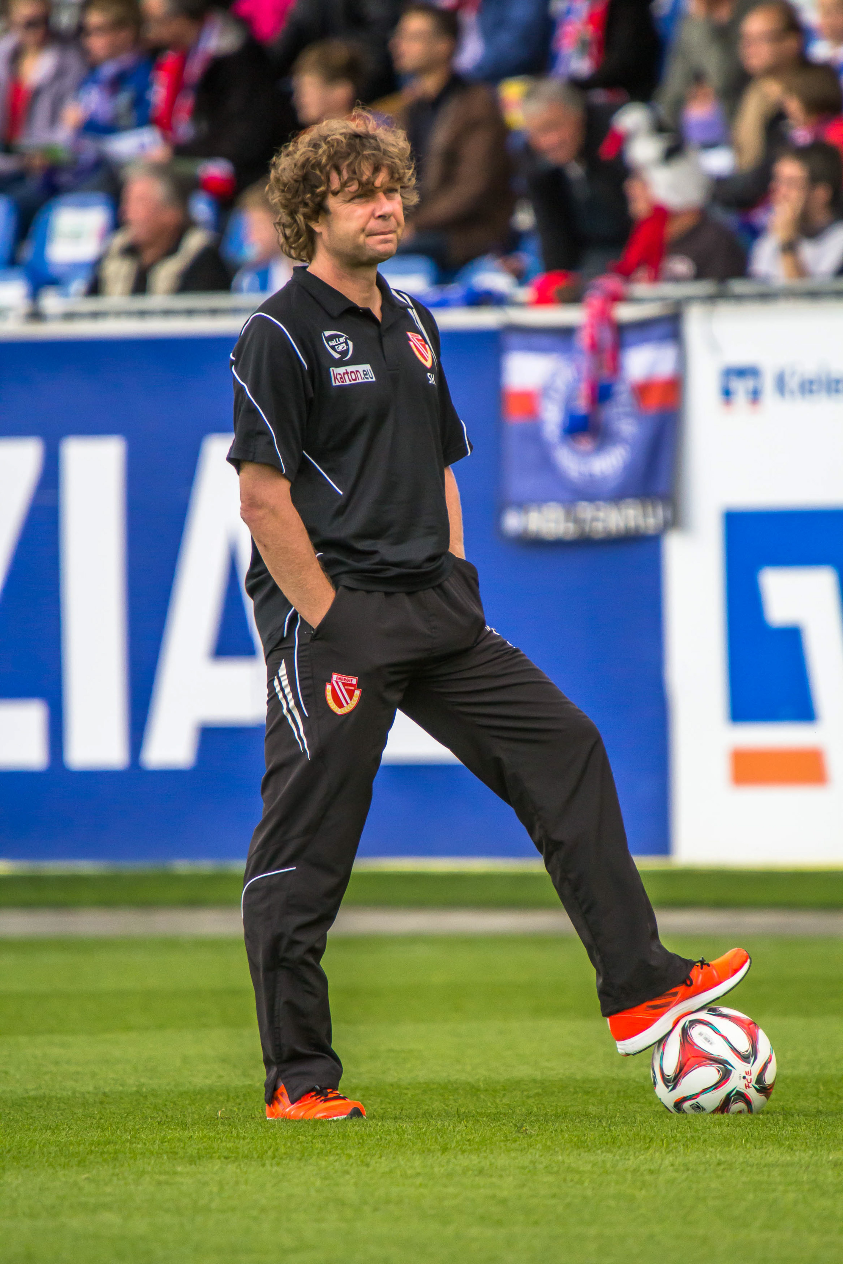 Stefan Krämer (2015)